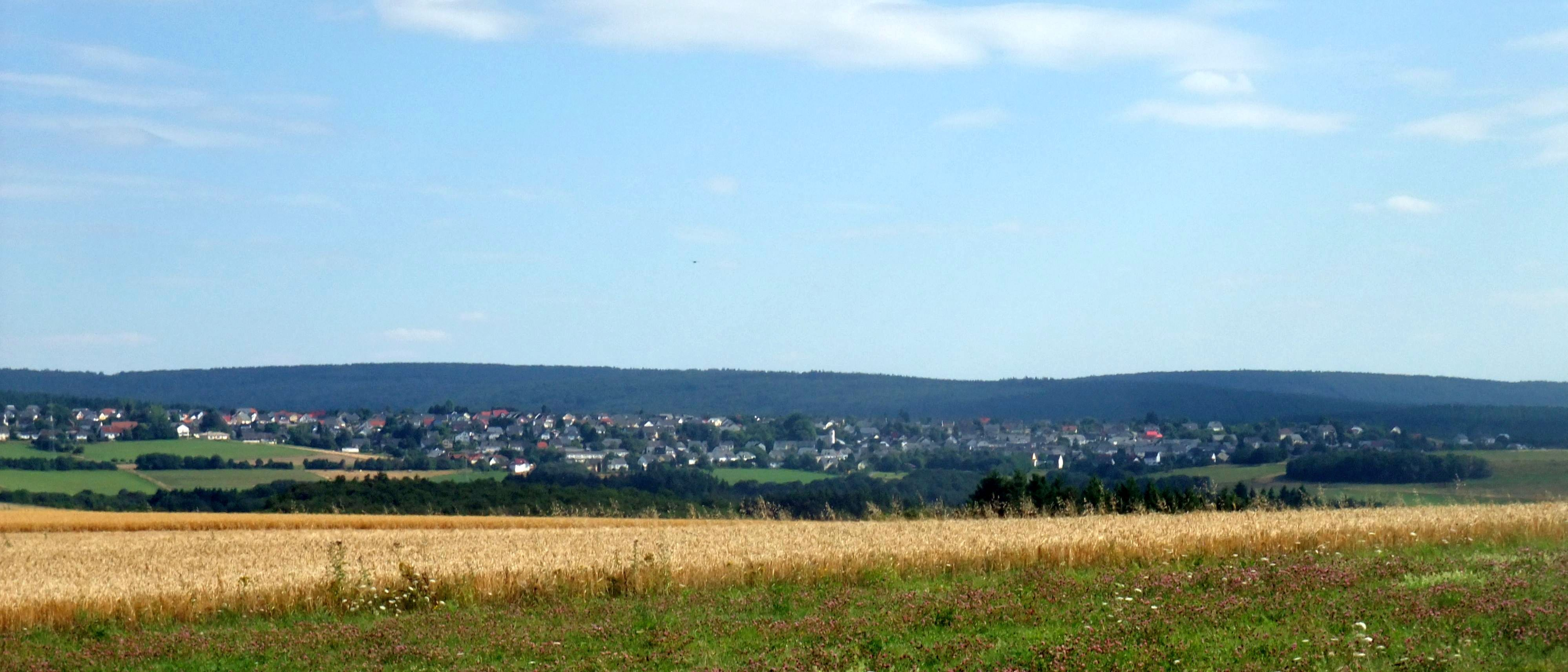 Osburg